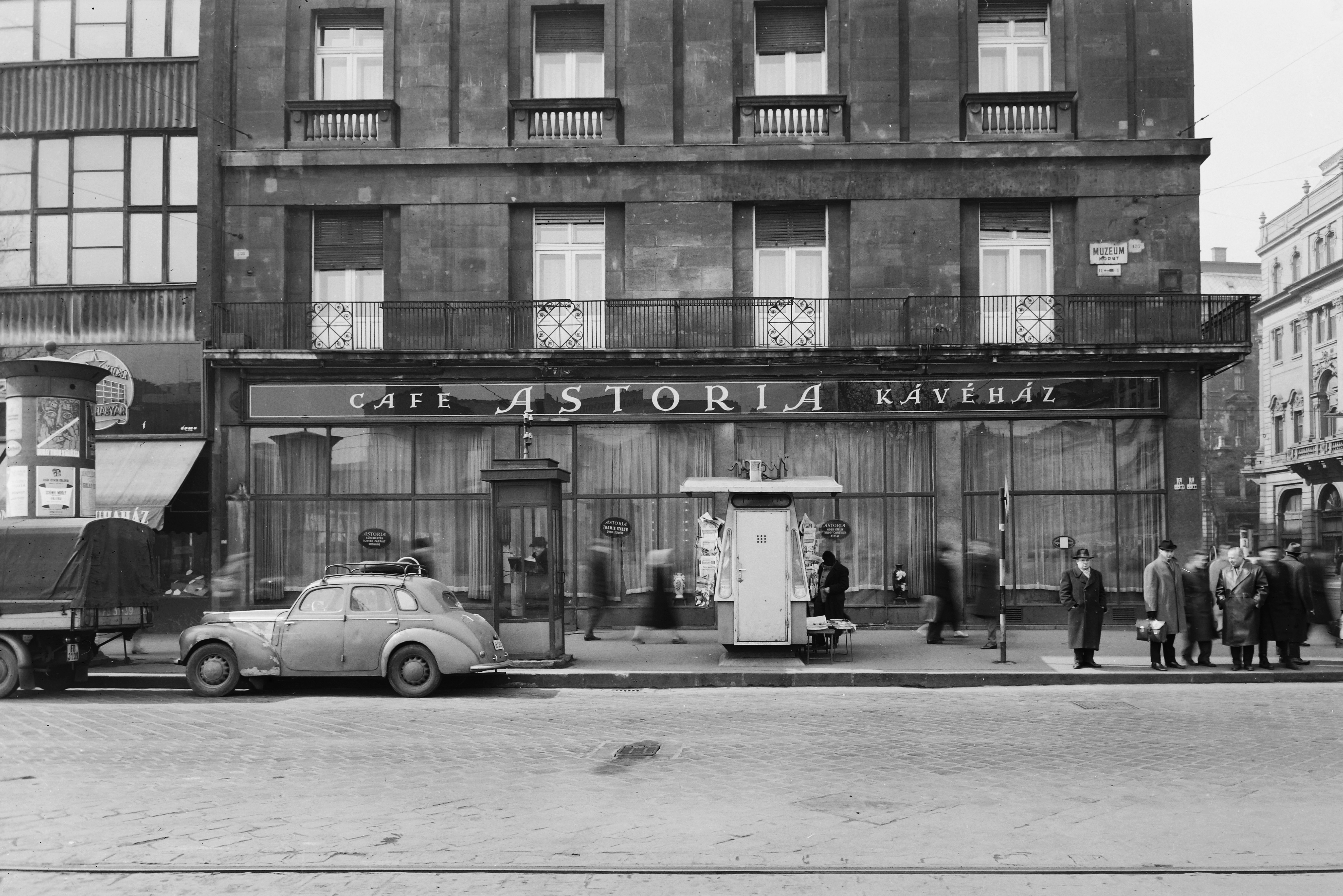 Múzeum körút, Astoria szálló. Location: Hungary, Budapest V. Tags: newsstand, street furniture, automobile, sign-board, hotel, coffe house, Budapest, phone booth Title: Múzeum körút, Astoria szálló.